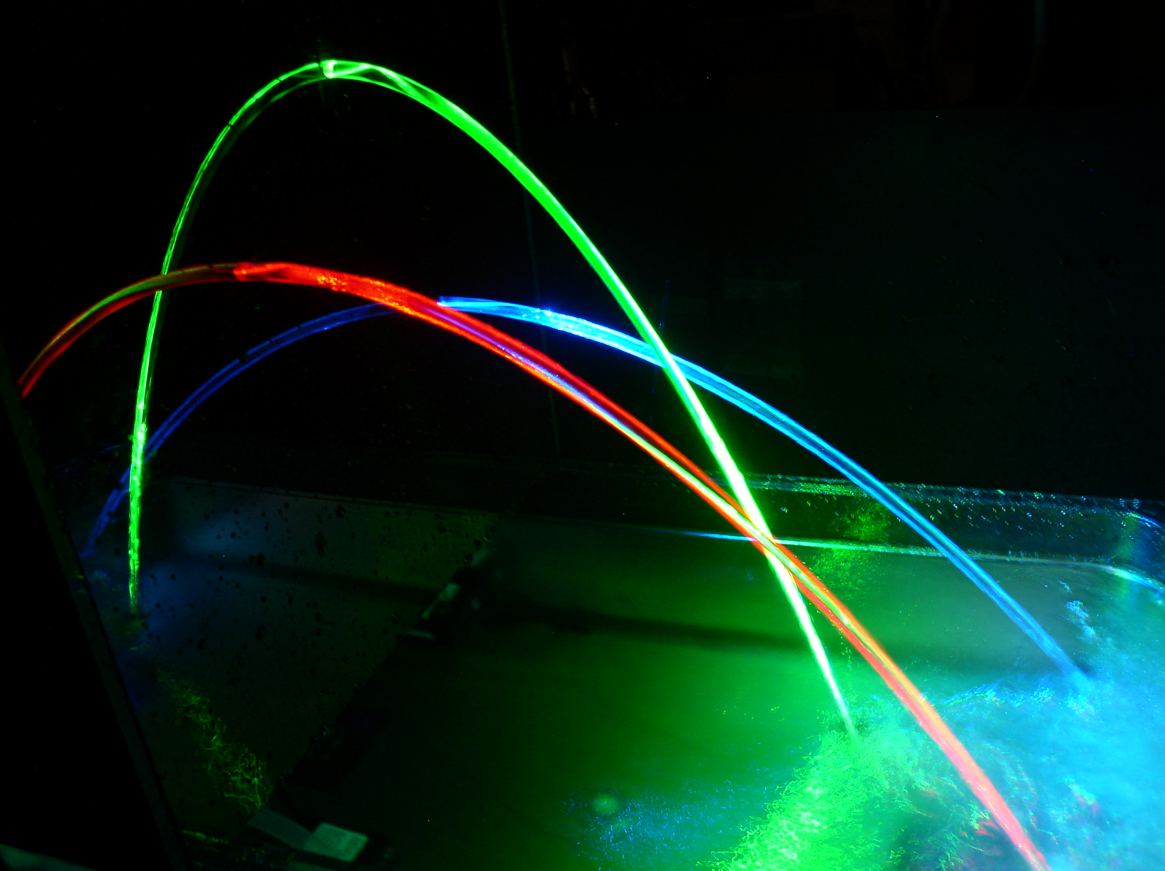 fontaine laser tricolore du Laboratoire de Physique des Lasers auteur : sebastien forget